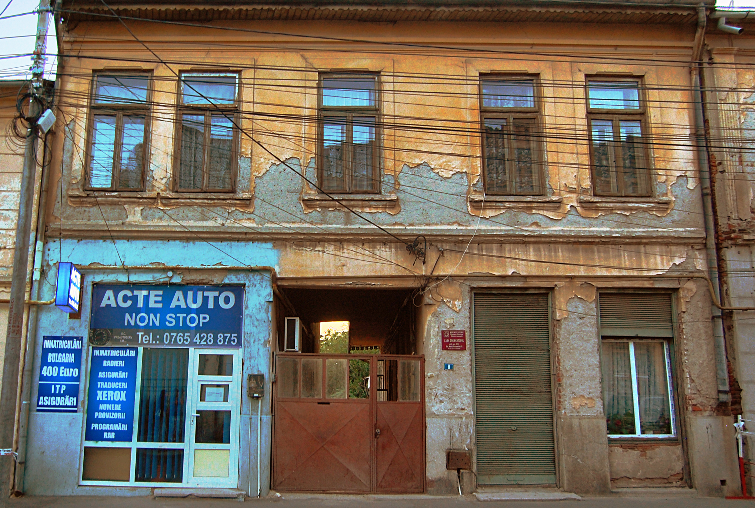 Str. Matei Basarab 8